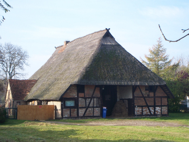 Fußwalmdach, historisches Bauernhaus in Bartenshagen